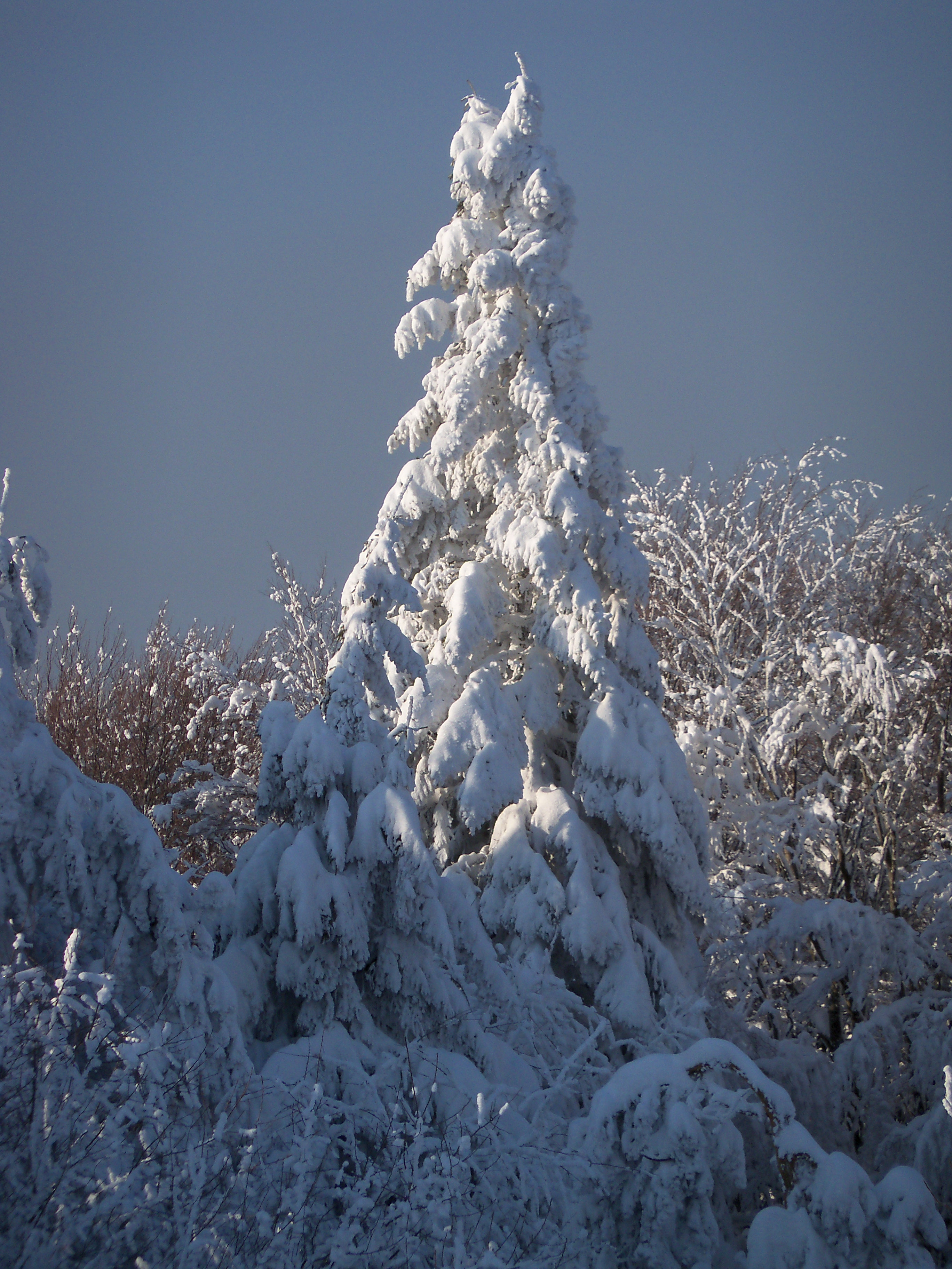 Фото